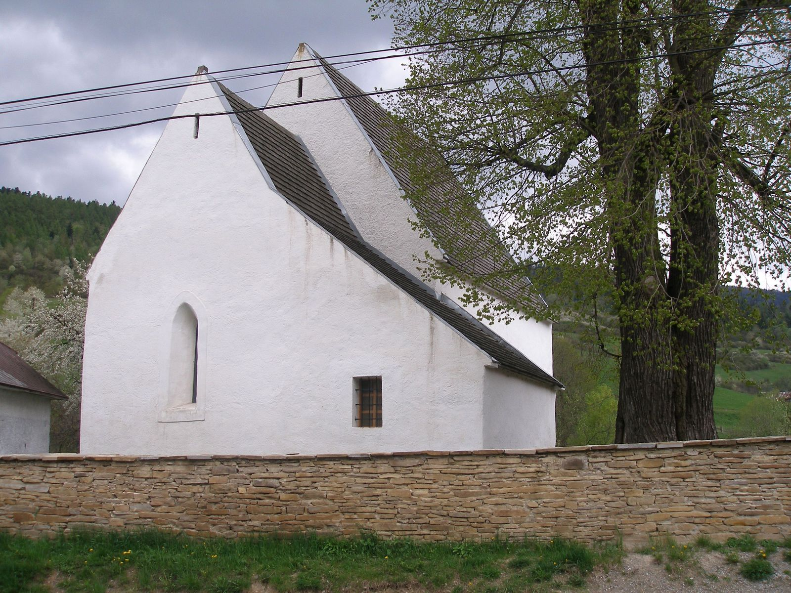 Obec Šindliar okres Prešov región Šariš